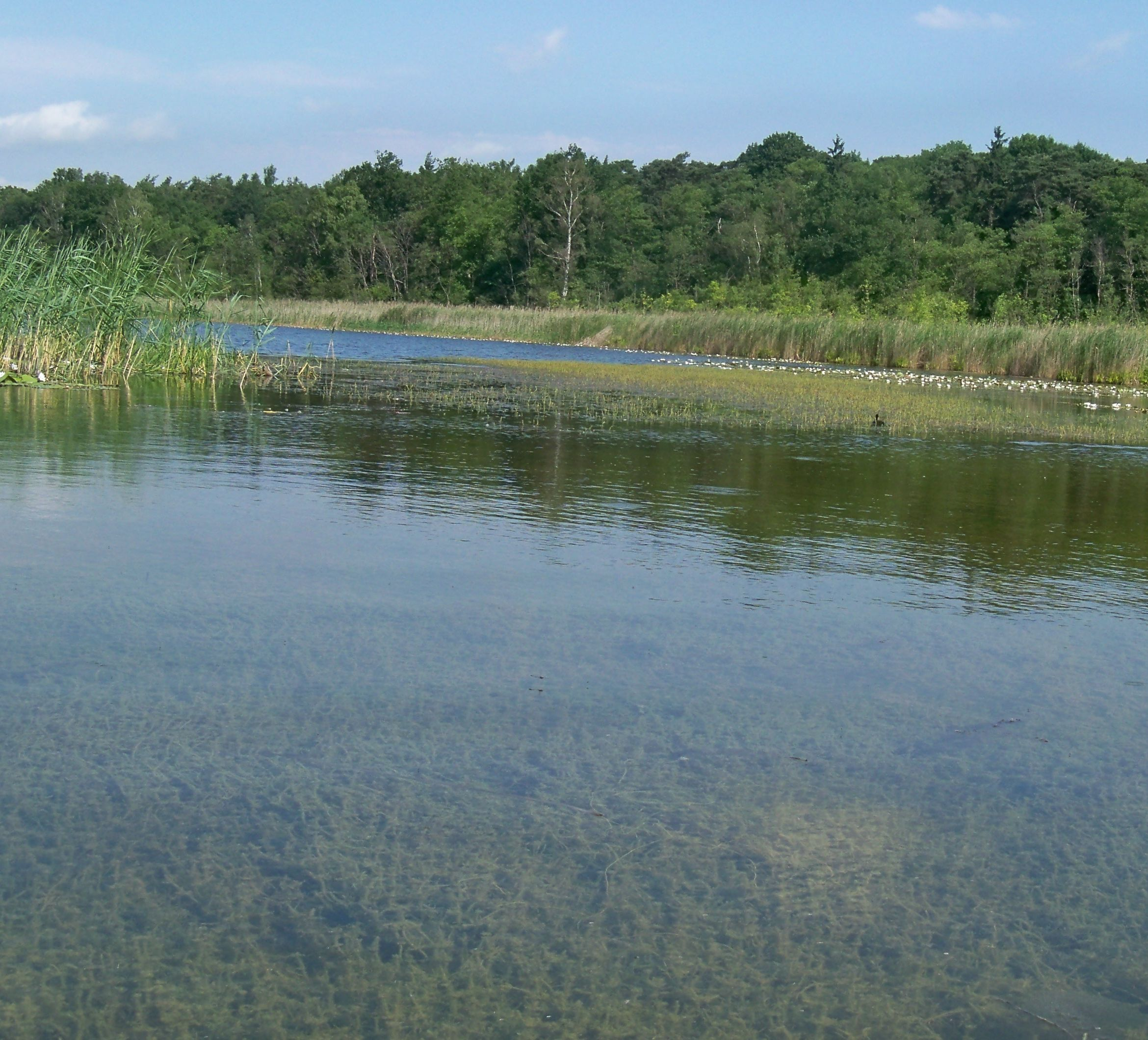 Łąka ramienicy kosmatej (Chara hispida) w Jeziorze Wielkowiejskim (Wielkopolski Park Narodowy)